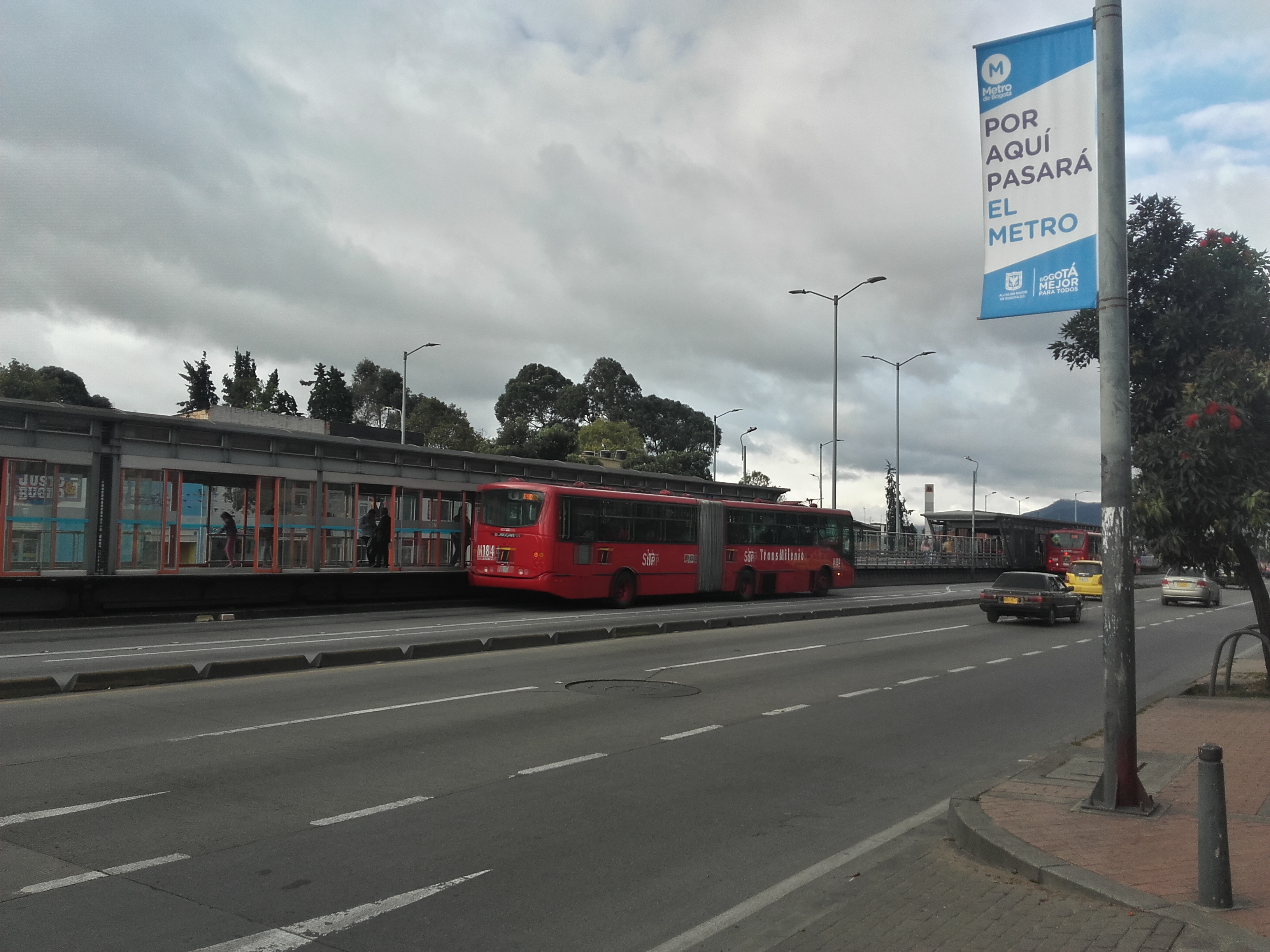 msmdldldldmd